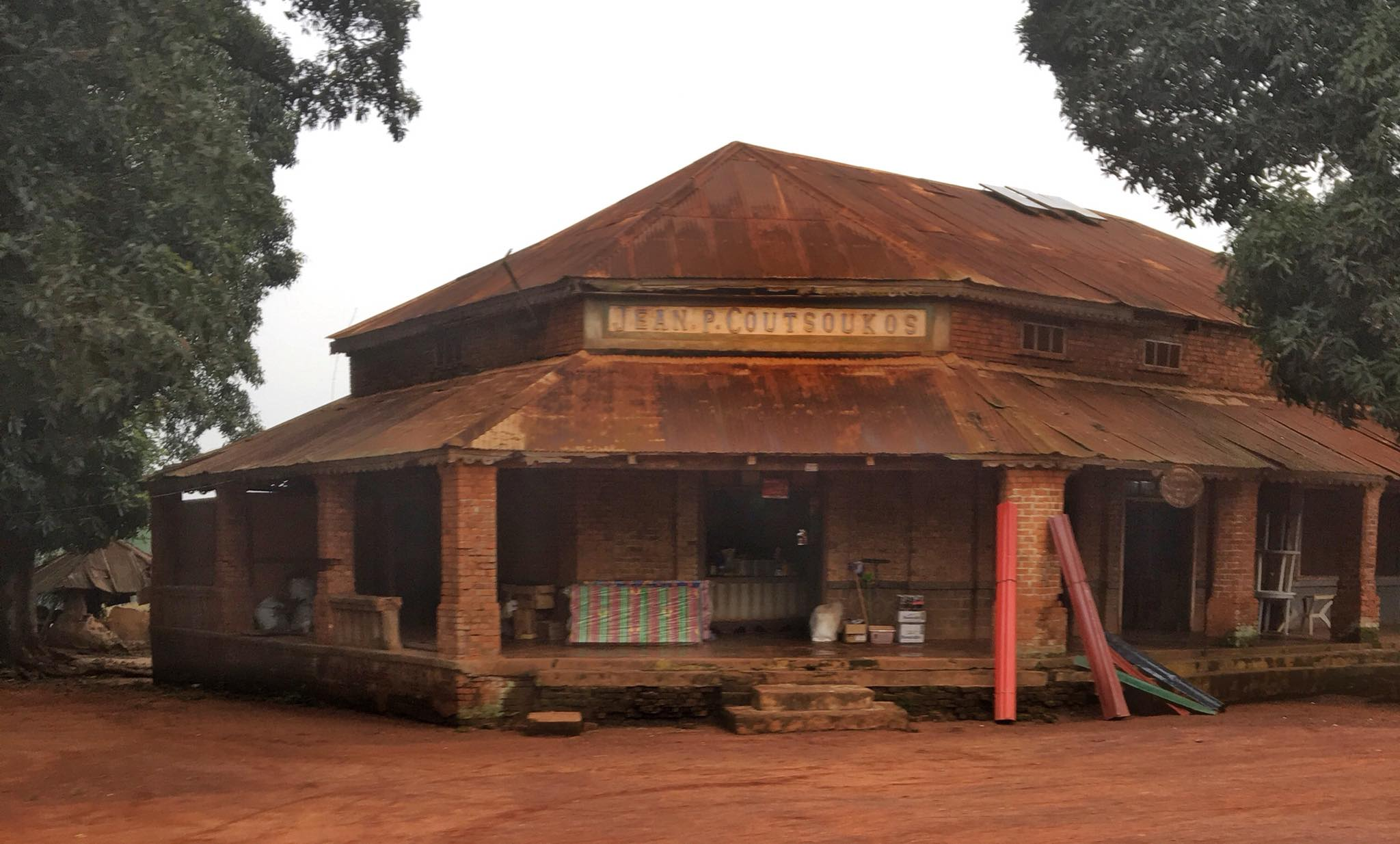 Ancien emporium grec à Dungu, Ituri, RDC